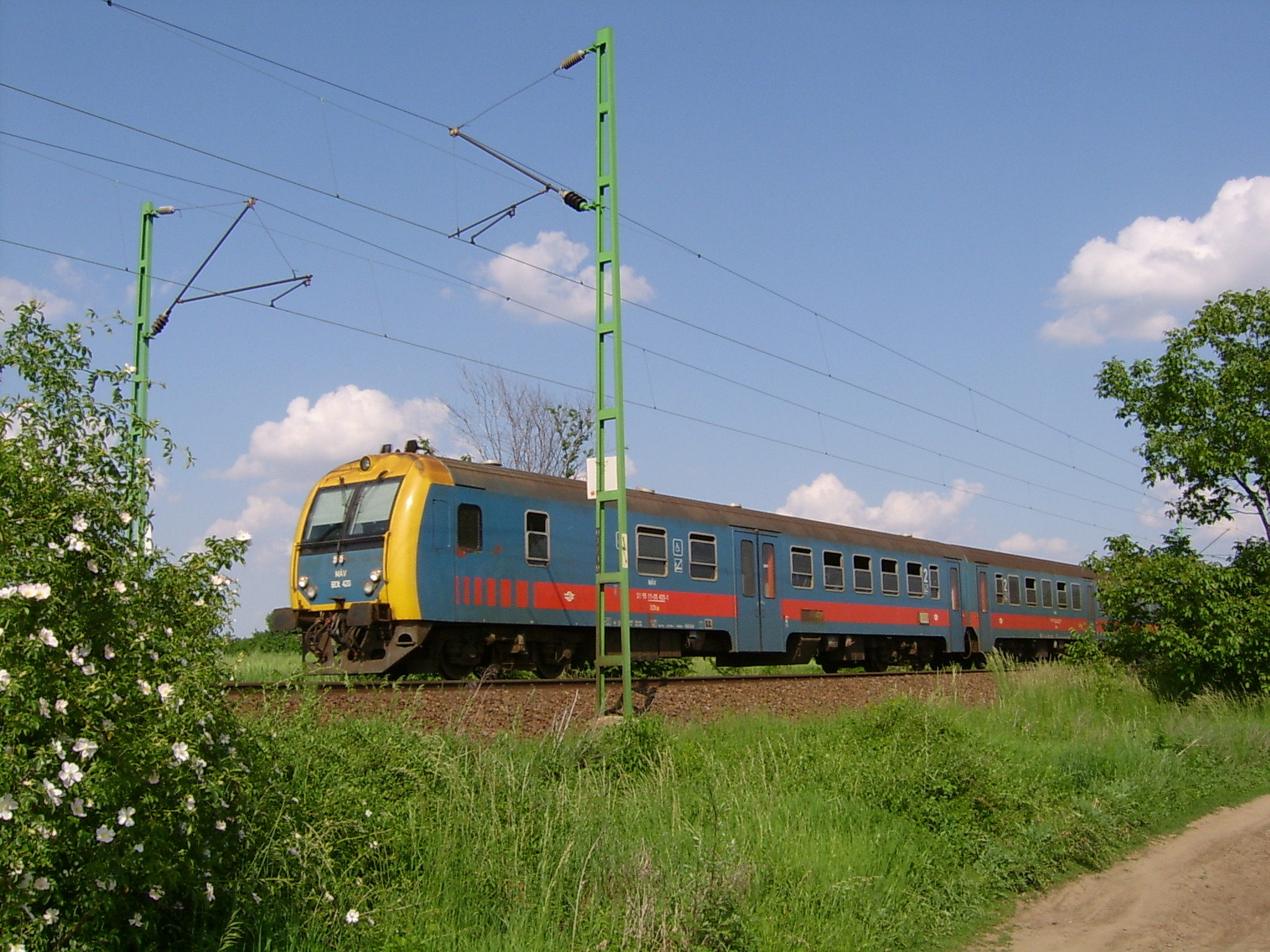 Személyvonat Gyömrő és Maglód-nyaraló között 2005. 04. 27-én Saját kép